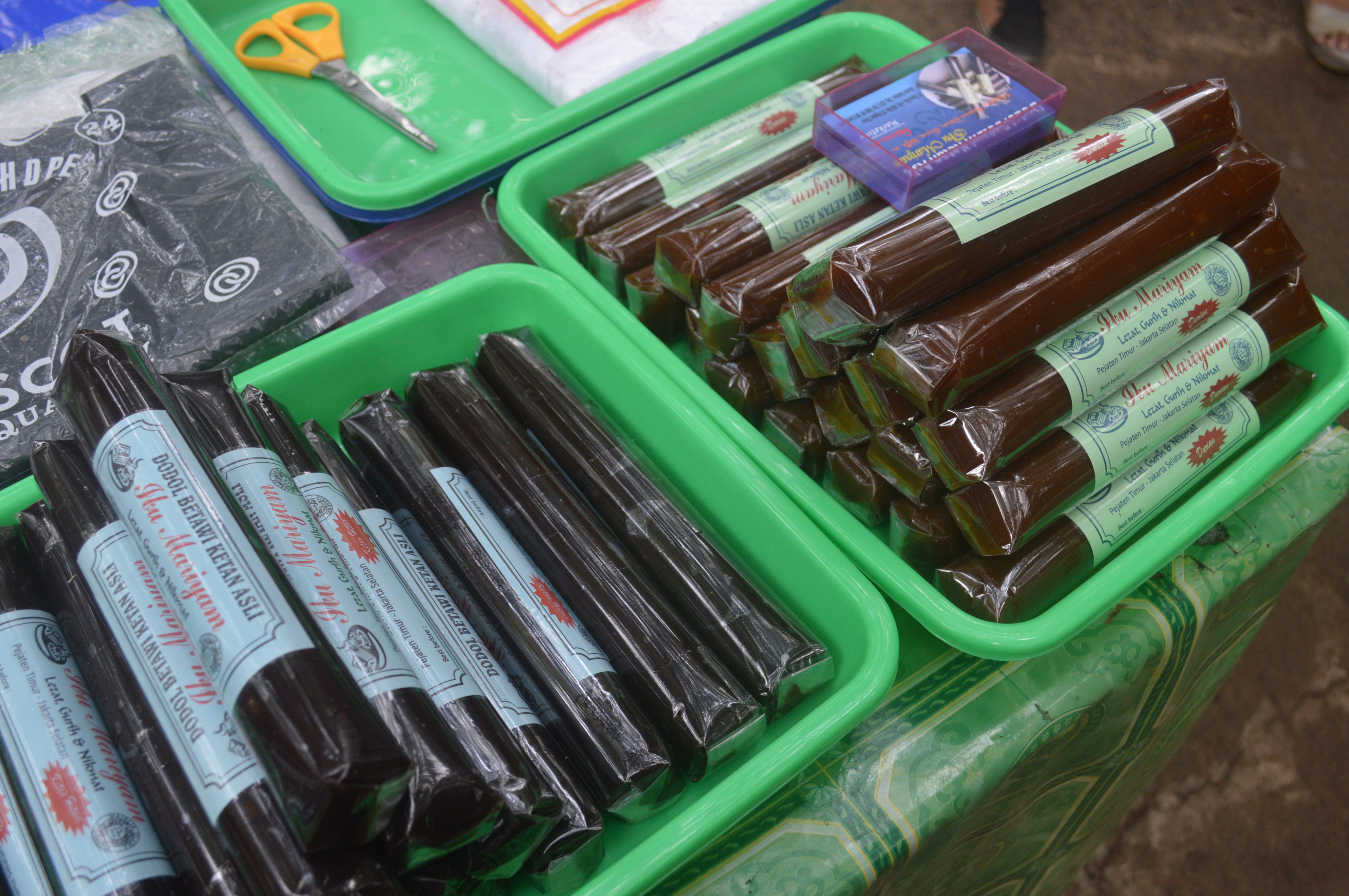 Dodol Betawi, makanan ringan tradisional khas masyarakat Betawi di Jakarta.